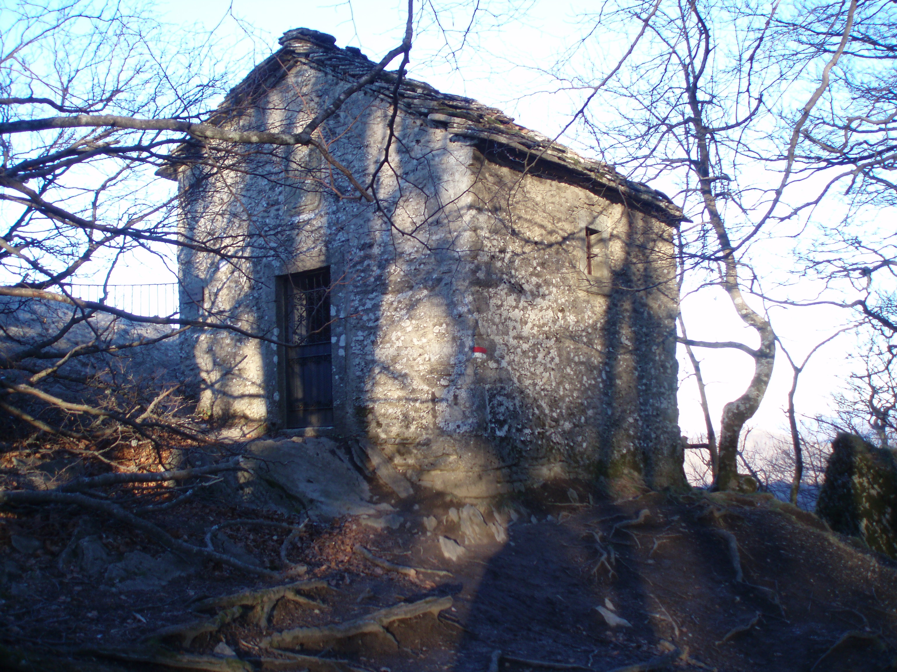 Santuario della Verna - 26 - Cappella della Penna